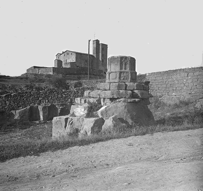 Base d ' una creu de terme a Manresa. Josep Salvany i Blanch (1918)